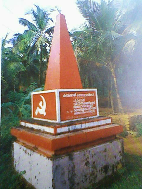 കാവുമ്പായി രതസാക്ഷികളുടെ സ്മാരകം